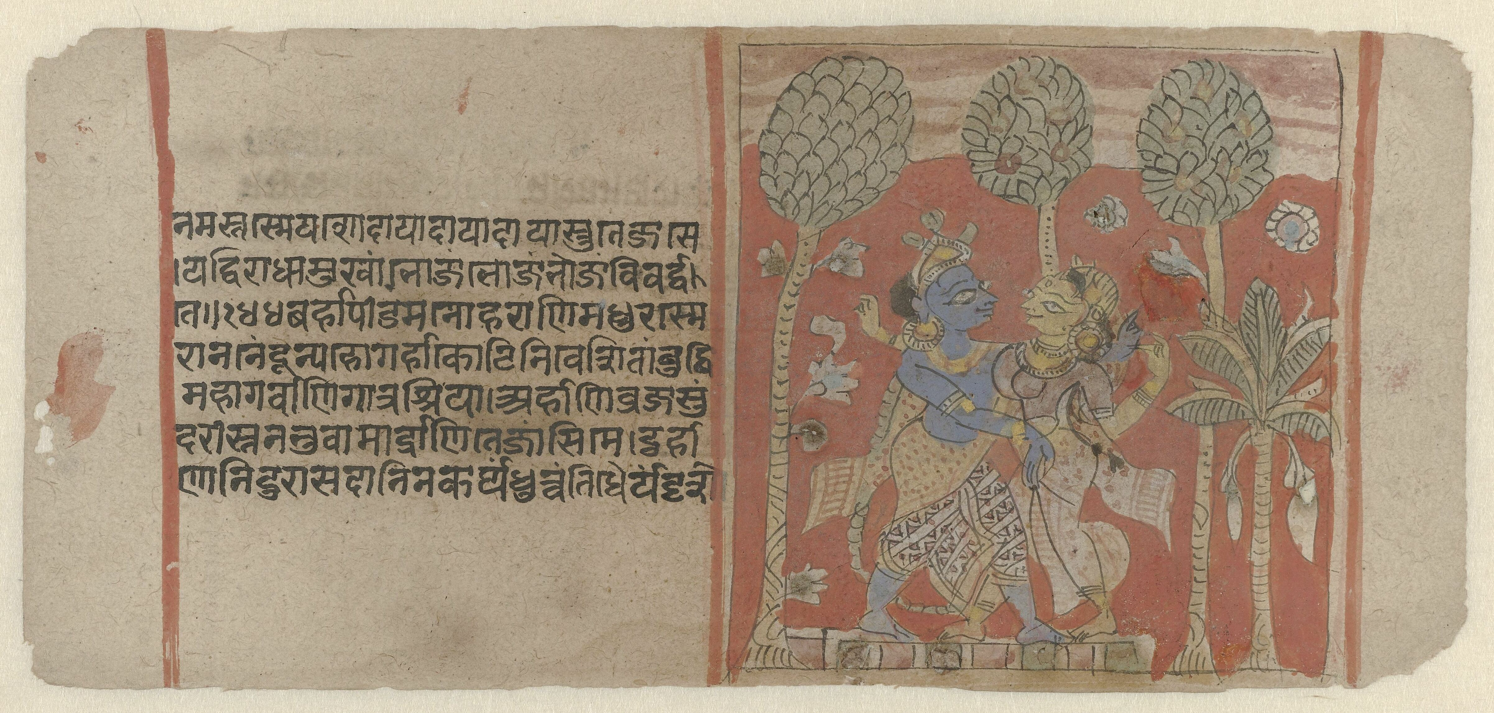 IdentificatieTitel(s): Krishna omhelst RadhaObjecttype: Indiase miniatuur Objectnummer: RP-T-1993-433Opschriften / Merken: inscriptie, recto: in linkerkolom tussen rode lijnen, tekst in oud-Indisch schriftinscriptie, verso: 8 regels tekst, eveneens tussen rode lijnen met aan weerszijden een grote rode stip in de kantlijn; deels met wit besmeerdOmschrijving: Er zijn twee van deze voorstellingen op een passepartout geplakt; op deze onderste omhelst Krishna Radha, ernaast een tekst in Sanskriet, uit de Balagopalastuti. Het tweede van twee bladen met voorstellingen uit de Balagopalastuti; beschadigingen op de achterkant overgeplakt met wit.VervaardigingVervaardiger: tekenaar: anoniemPlaats vervaardiging: Gujarat (mogelijk)Datering: ca. 1450 - ca. 1475Fysieke kenmerken: gouache, met pen en zwarte inktMateriaal: papier gouache (waterverf) Techniek: penseelAfmetingen: blad: h 106 mm × b 232 mmvoorstelling zonder tekst: b 96 mmtekstkolom: b 86 mmVerwerving en rechtenCredit line: Schenking van de heer P. Formijne, AmsterdamVerwerving: schenking 1993Copyright: Publiek domein